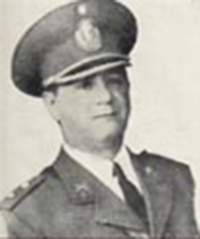 Tomas Adolfo Ducó, presidente de Huracán.